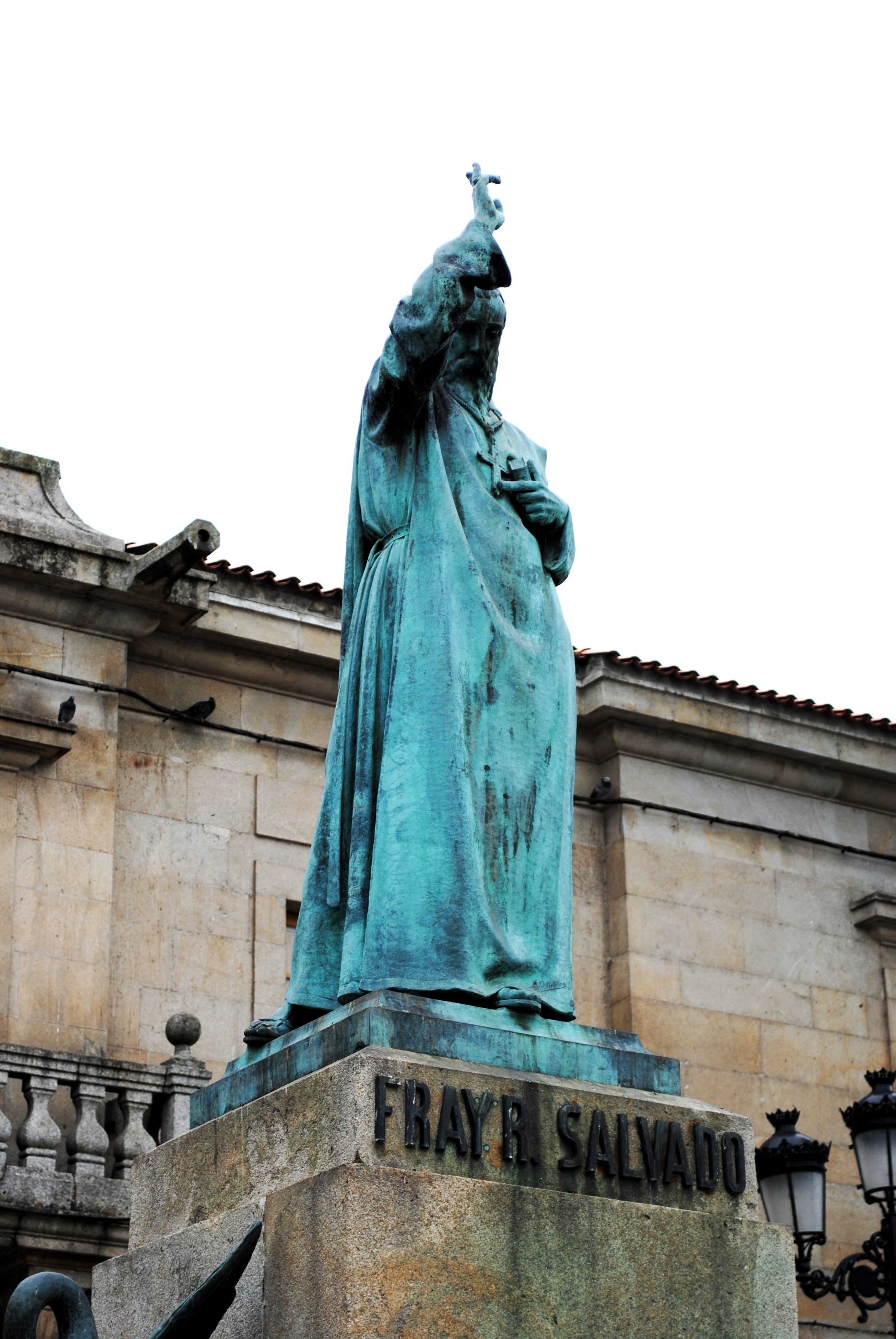 Plaque: "En gratitude ao tudense Frei Rosendo Salvado polo traballo apostólico e o inmenso labor realizado cos aborixes australianos no CLX aniversario da fundación de Nova Nursia. In gratitude to the tudense Fr. Rosendo Salvado for his dedication and apostolic work with the aborigines in New Norcia, Australia, on this 160th anniversary. Sendo embaixador de Australia en España o Excmo. Sr. Noel Campbell e alcalde de Tui o Ilmo. Sr. D. Antonio F. Fernández Rocha. Xuño 2007"